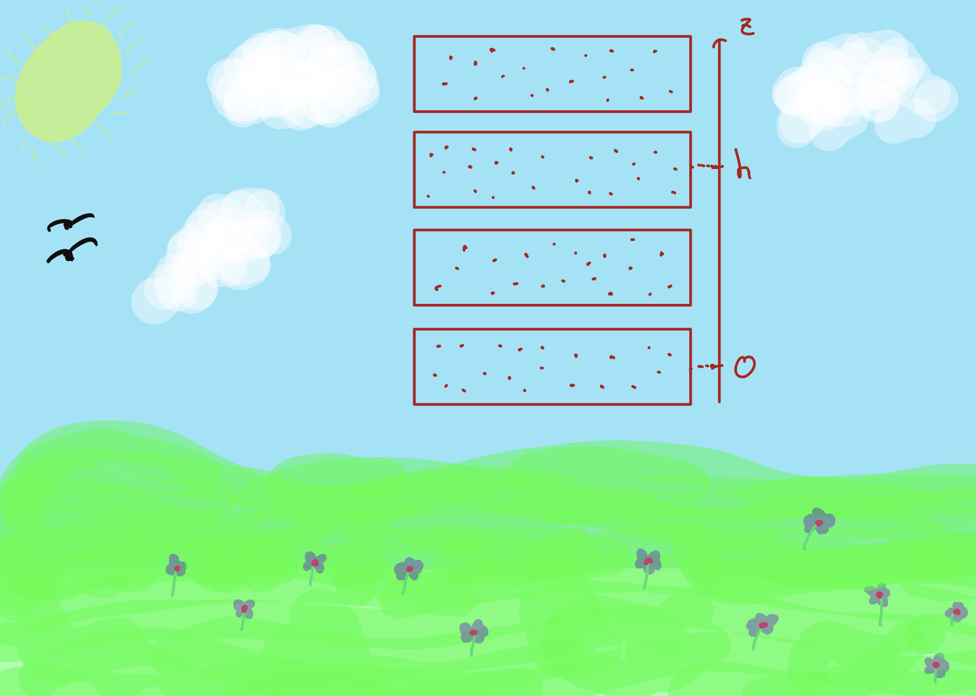 פיתוח הנוסחה הברומטרית